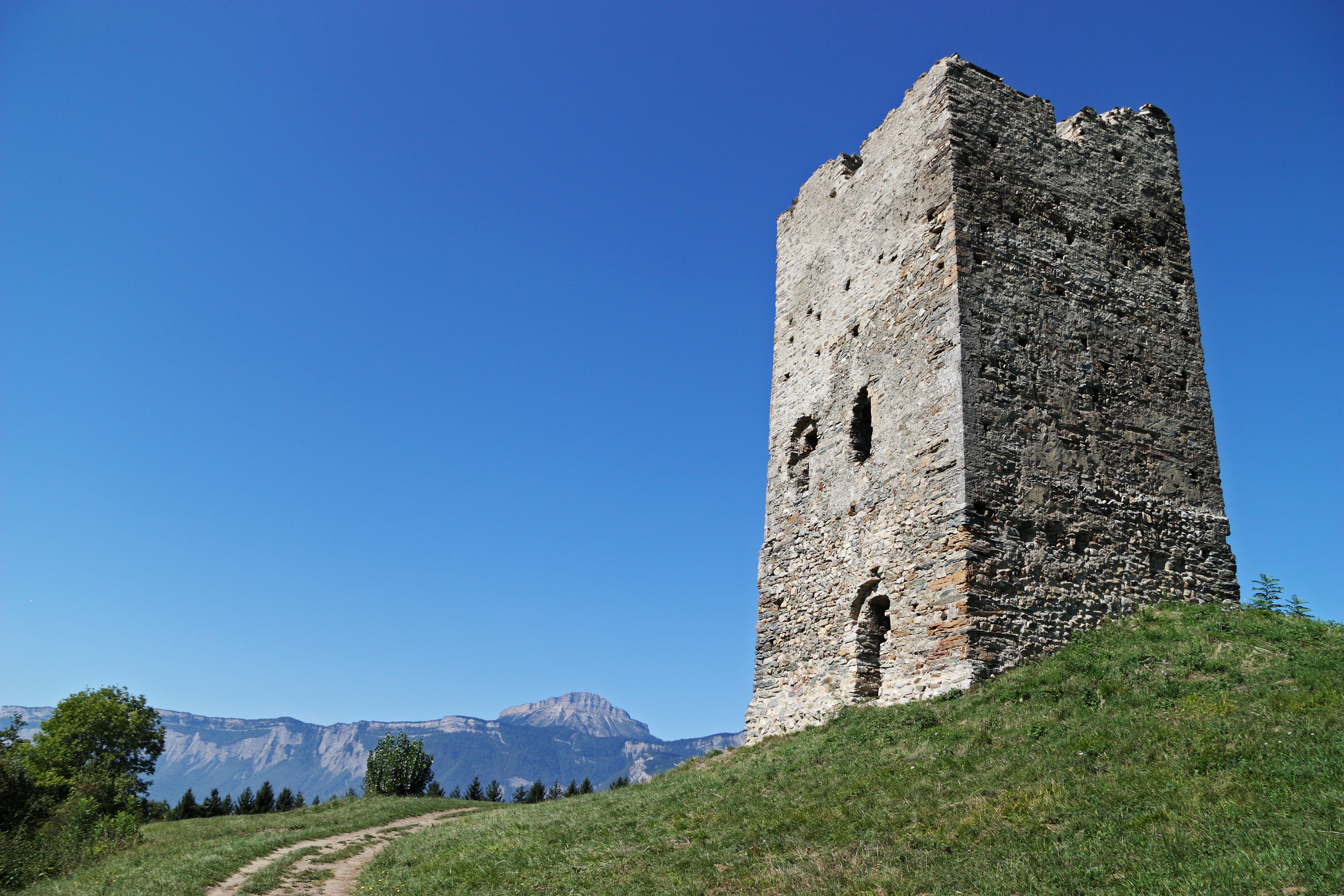 Tour de Montfallet .